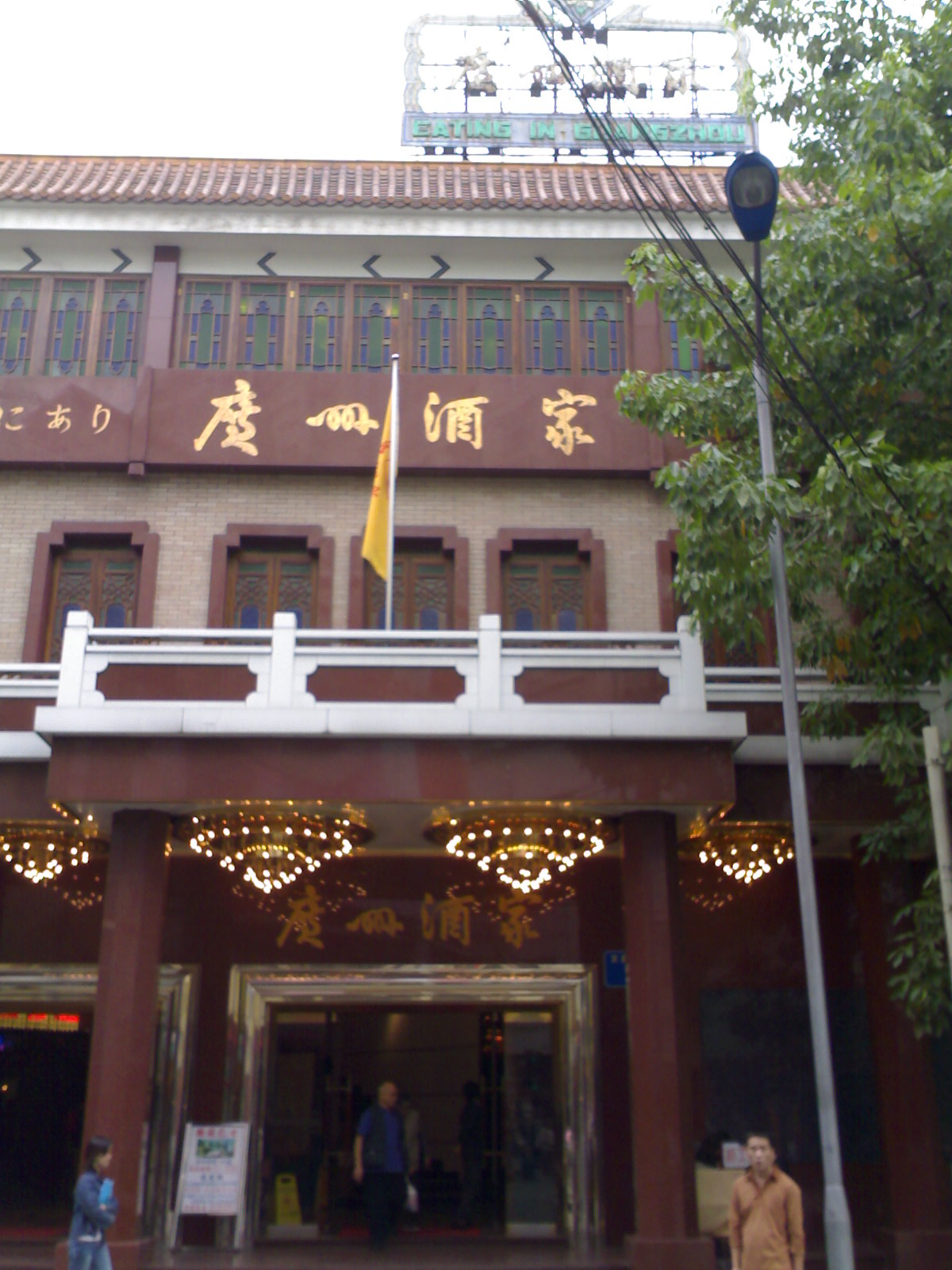 广州酒家总店